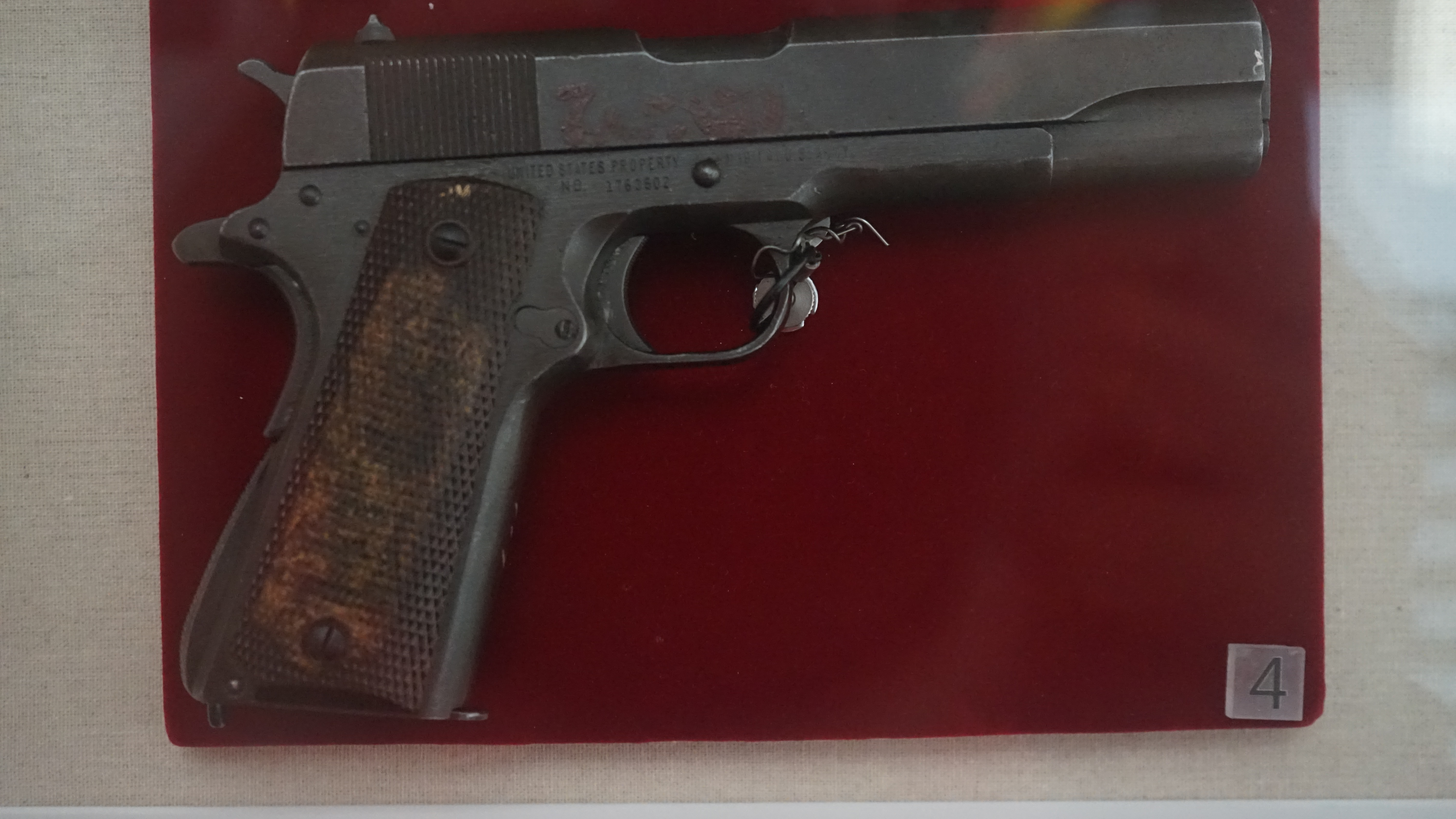 中文（中国大陆）: 解放一江山岛时缴获的美国造柯尔特M1911A1式0.45英寸手枪。一级文物。